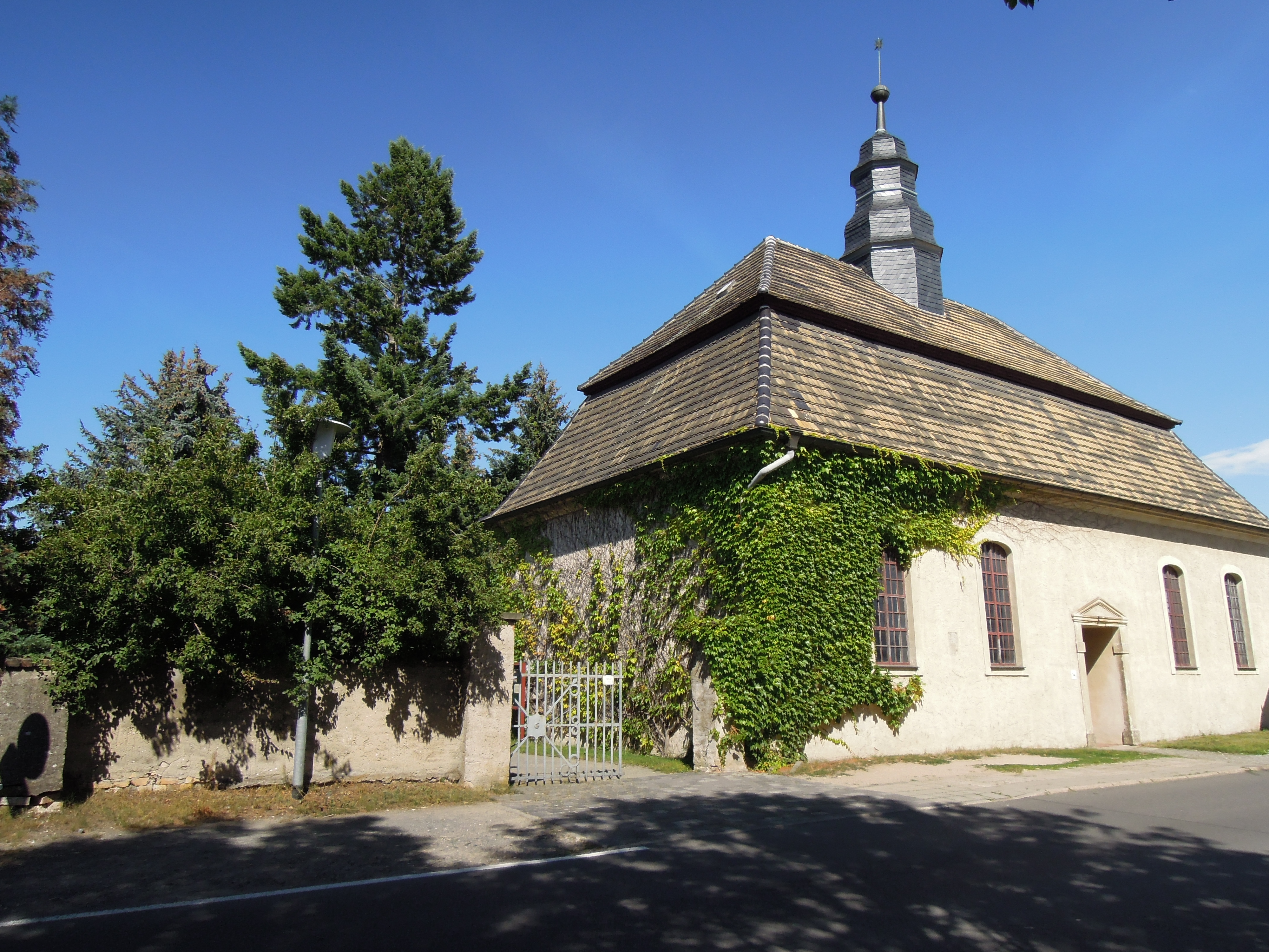 Friedhofskapelle Bad Schmiedeberg -Südwestansicht- im August 2020